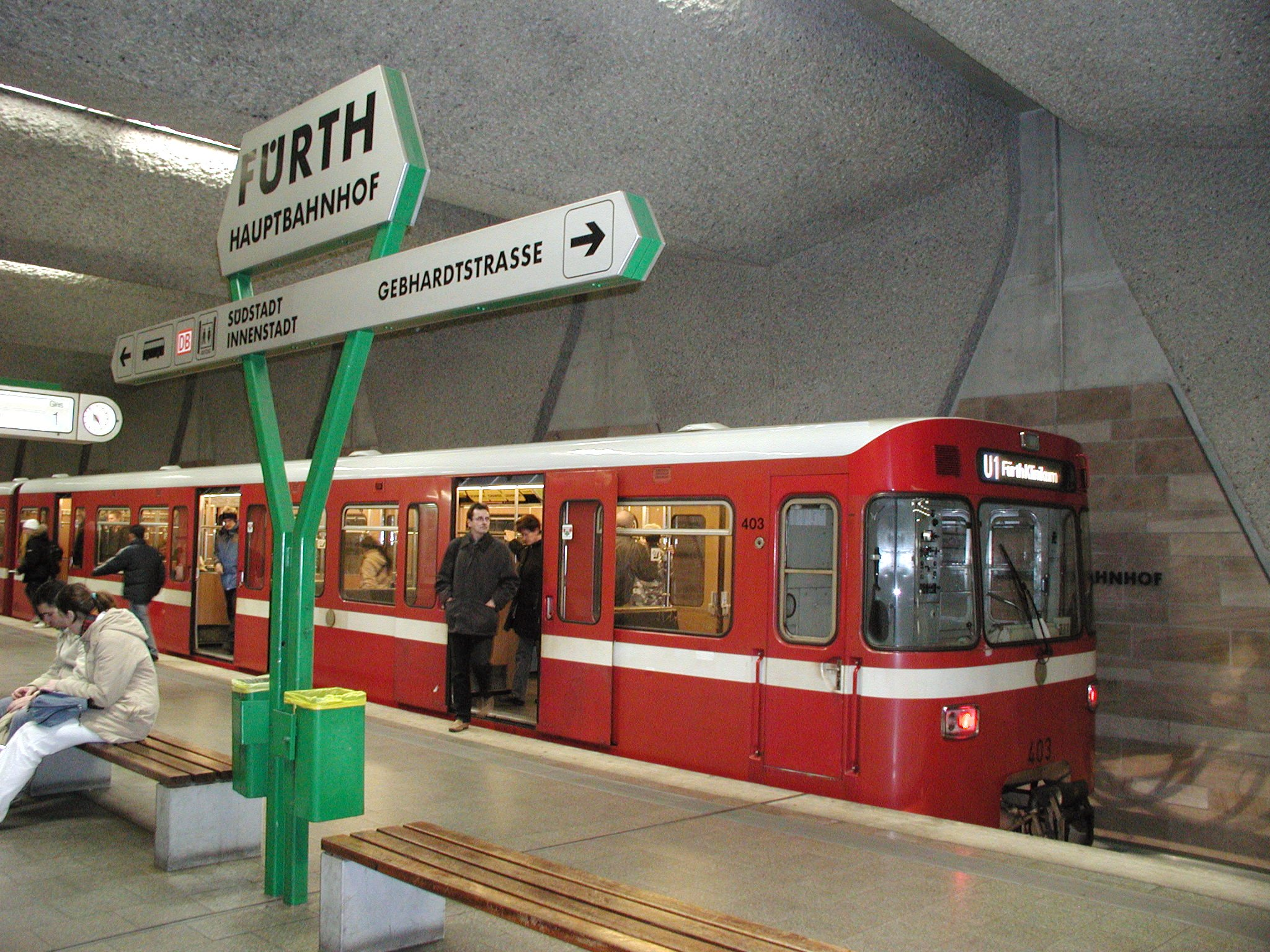 U-Bahnhof Fürth Hauptbahnhof